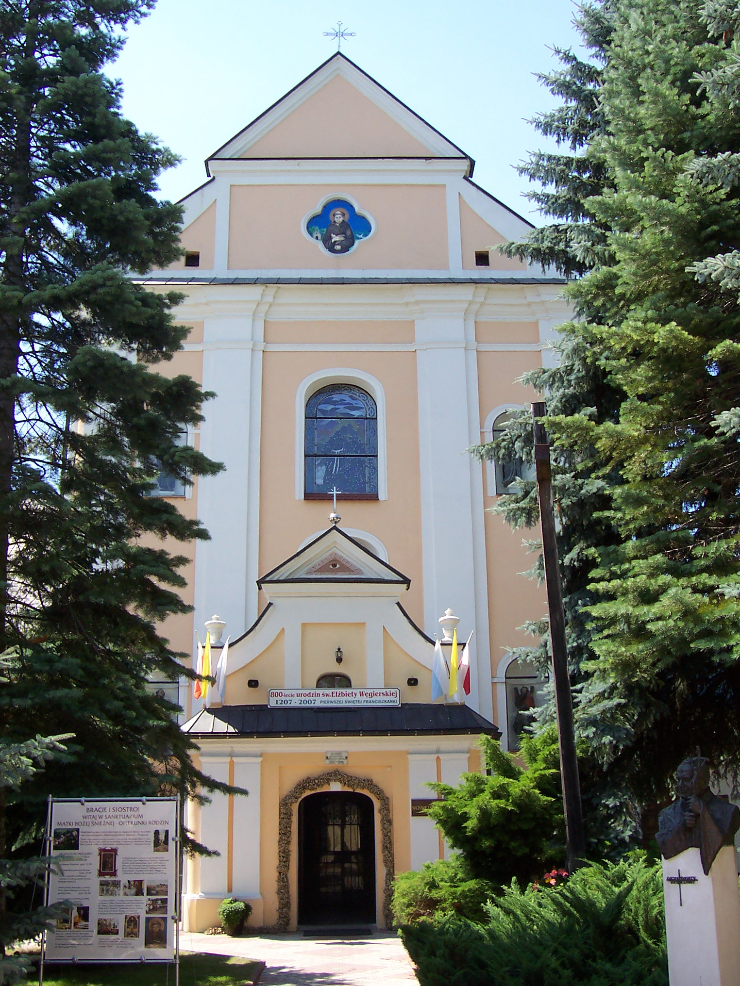 Sanktuarium Matki Bożej Śnieżnej Opiekunki Rodzin w Pilicy